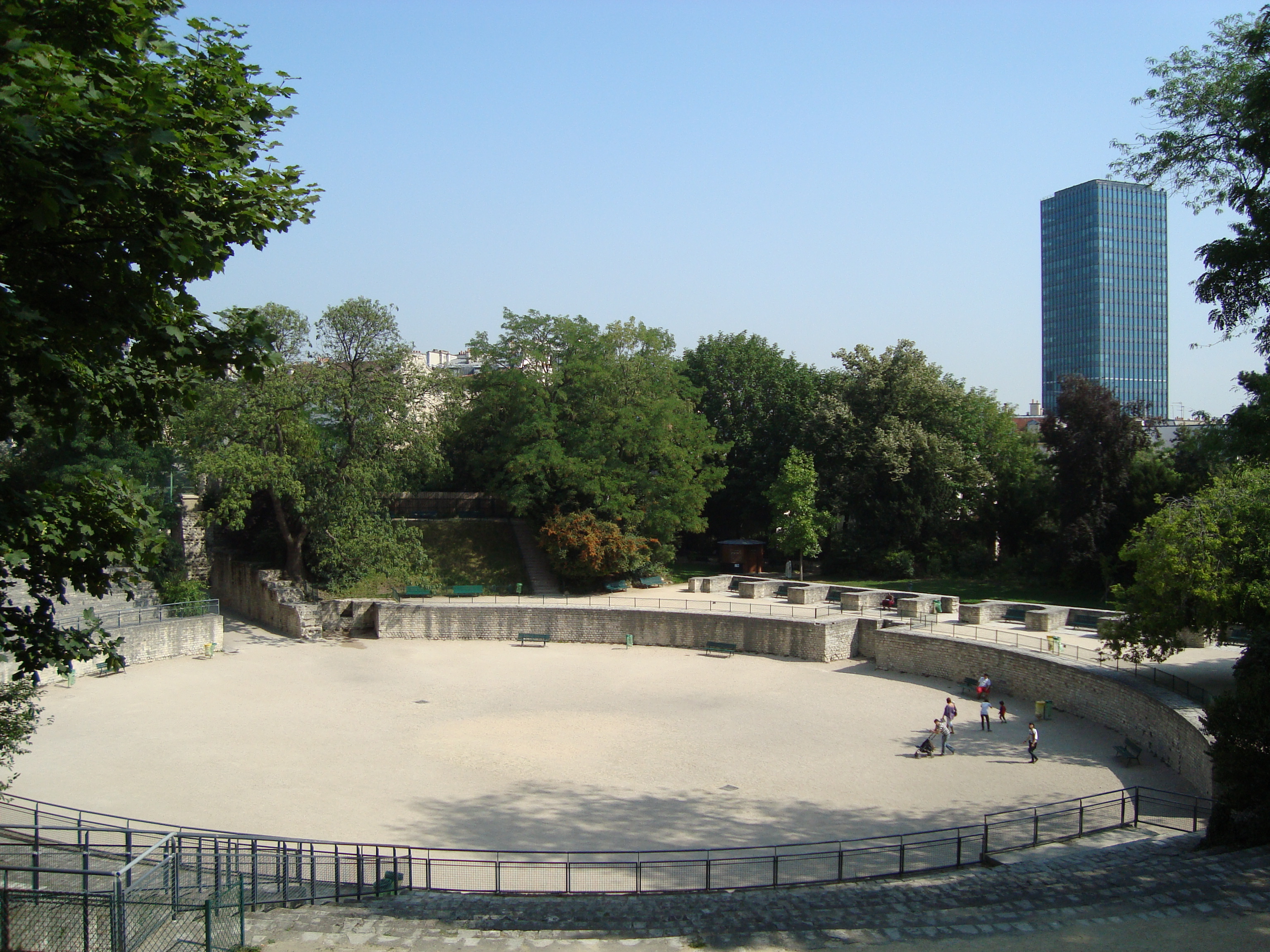 Les Arènes de Lutèce et la tour Zamansky du campus Jussieu